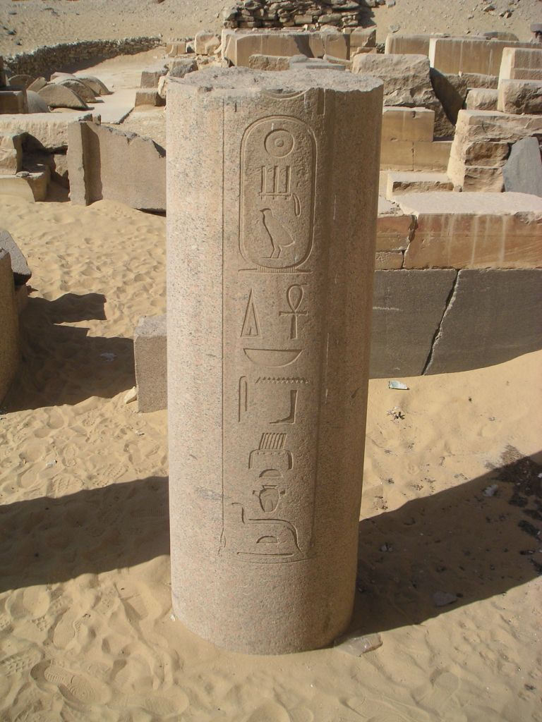 Colonne d'une des annexes du temple funéraire de Sahourê à Abousir